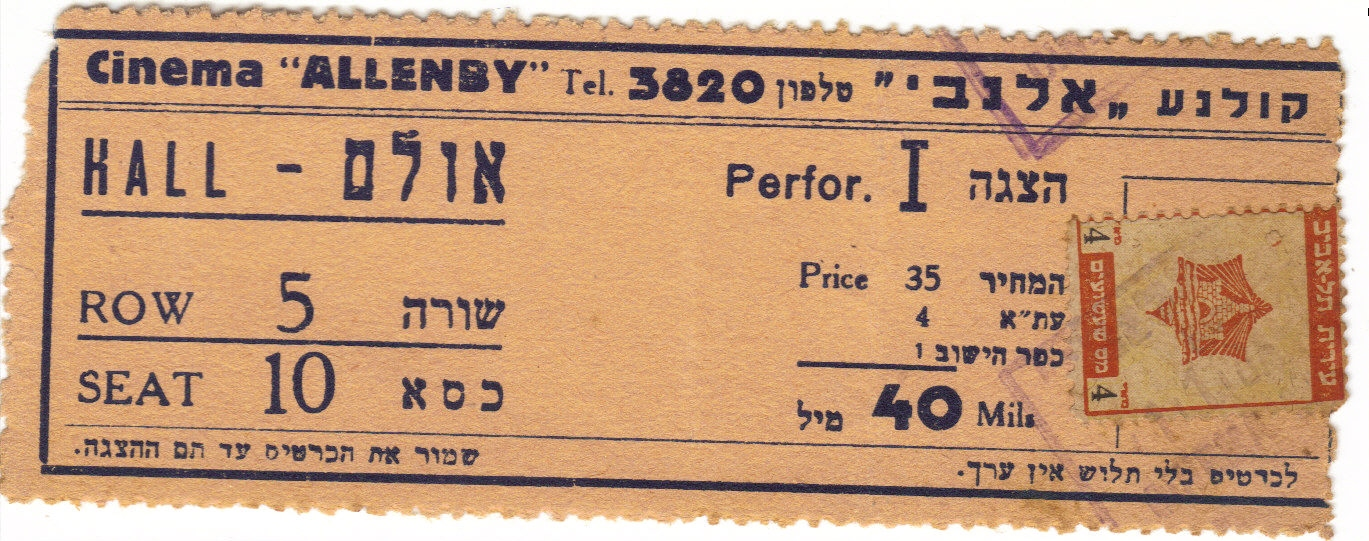 כרטיס כניסה להצגה "בסינמה אלנבי"